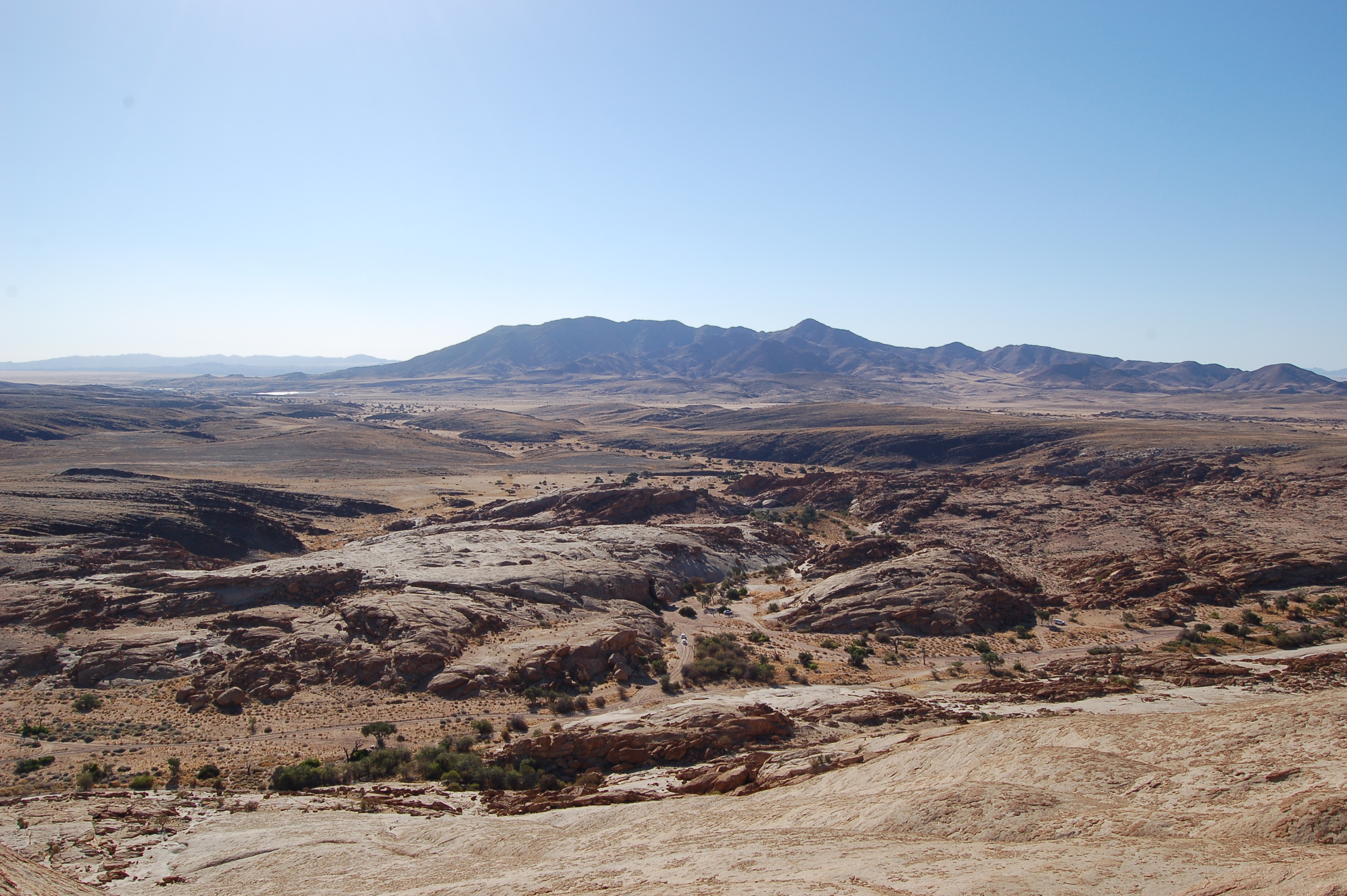 Bloedkoppie, Namibia